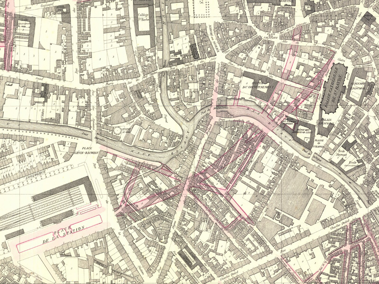 Een kaart met het Zollikofer - De Vigneplan: tracés van straten (voornamelijk de Vlaanderenstraat) die het station Gent-Zuid met het stadscentrum moesten verbinden.